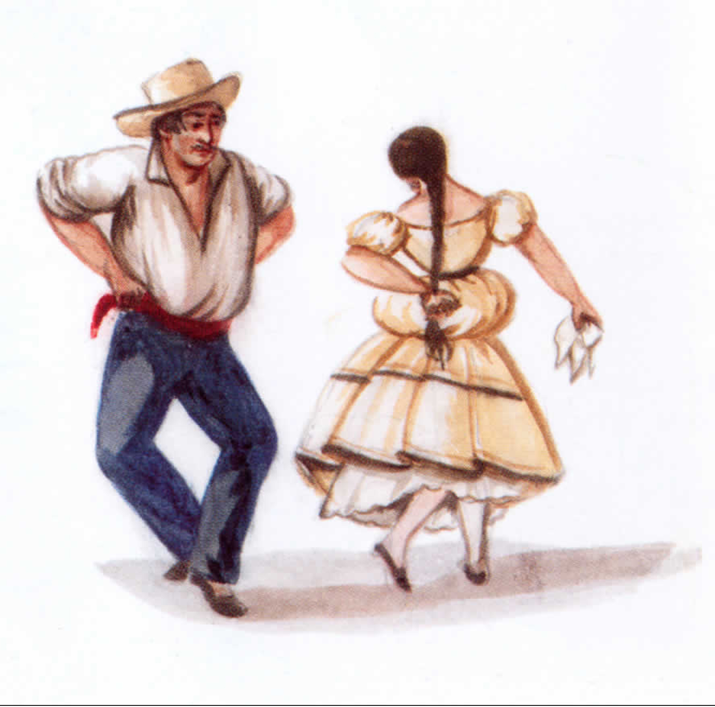 Marinera, según el acuarelista peruano Pancho Fierro